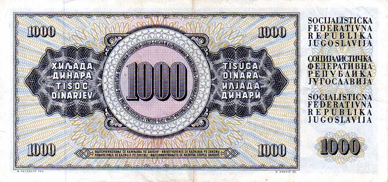 1000 Yugoslav dinar (1981) - reverse